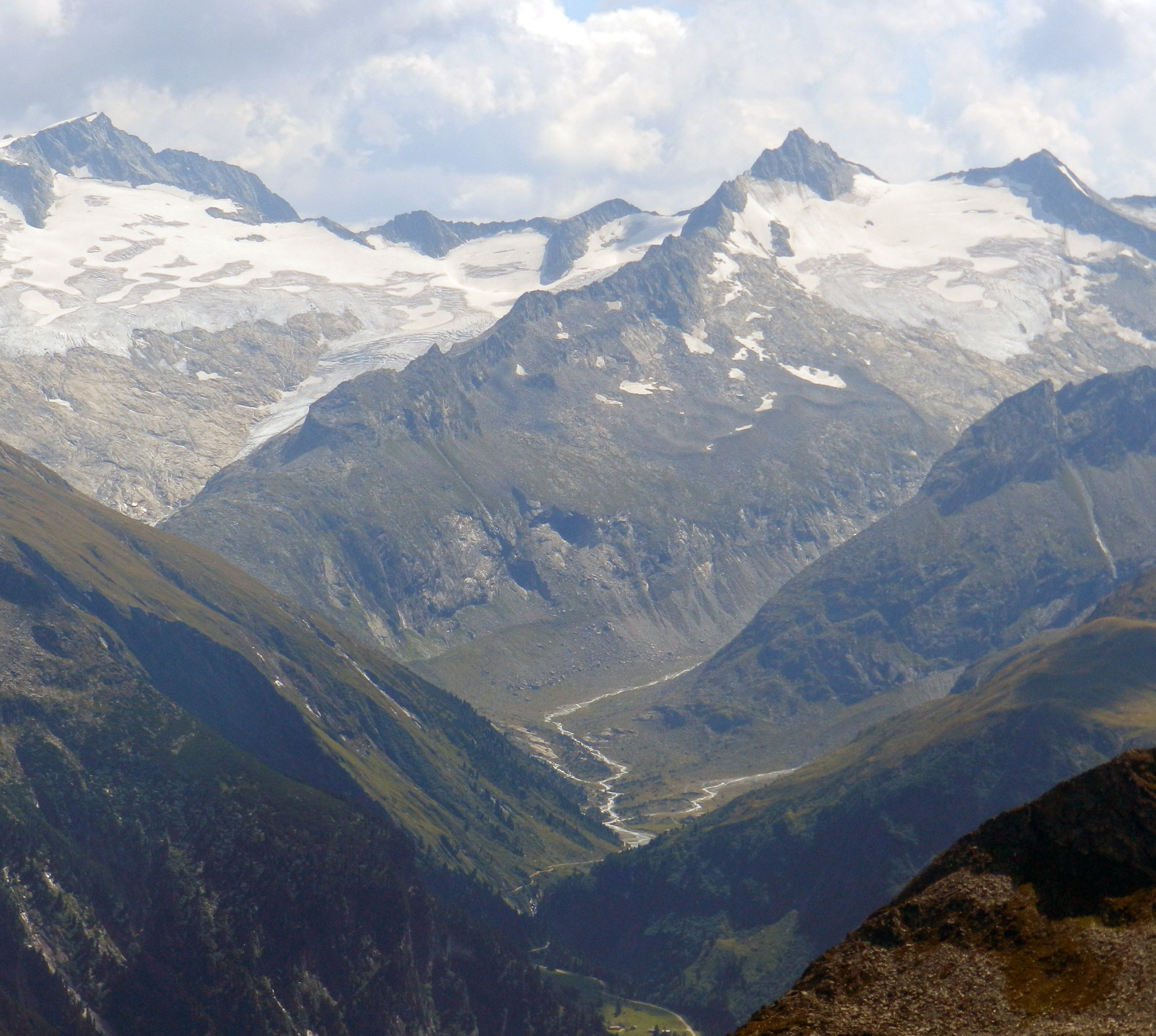 Blick aus dem Wesendlekar in den Zemmgrund (Tirol, Österreich). Gipfel (vlnr): Schwarzenstein, III. Hornspitze (Berliner Spitze), IV. Hornspitze.